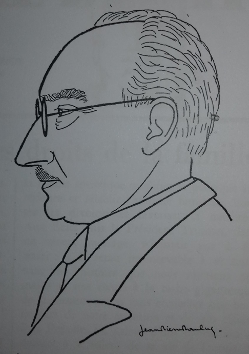 Portrait de Marcq